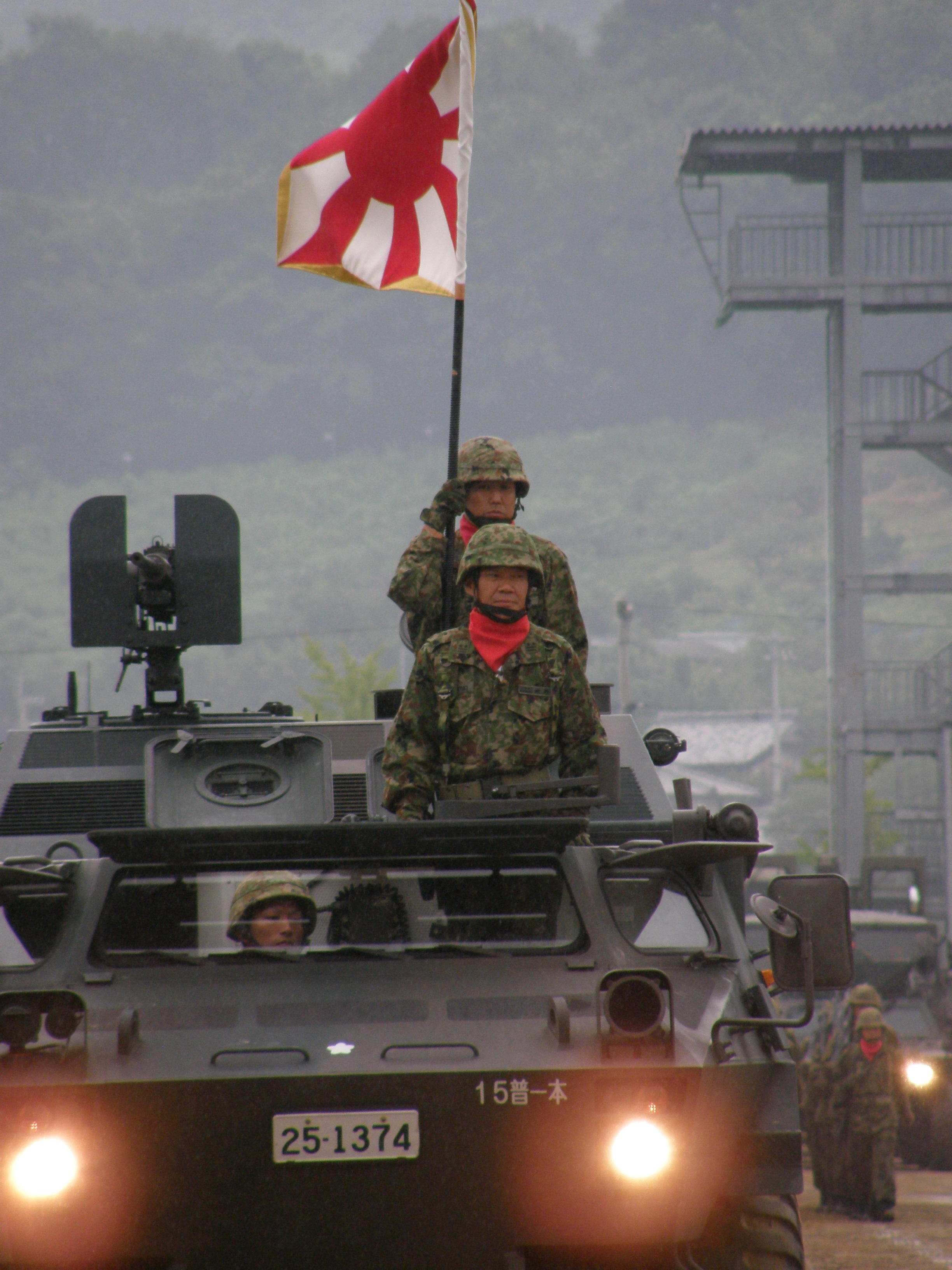 指揮官は副連隊長